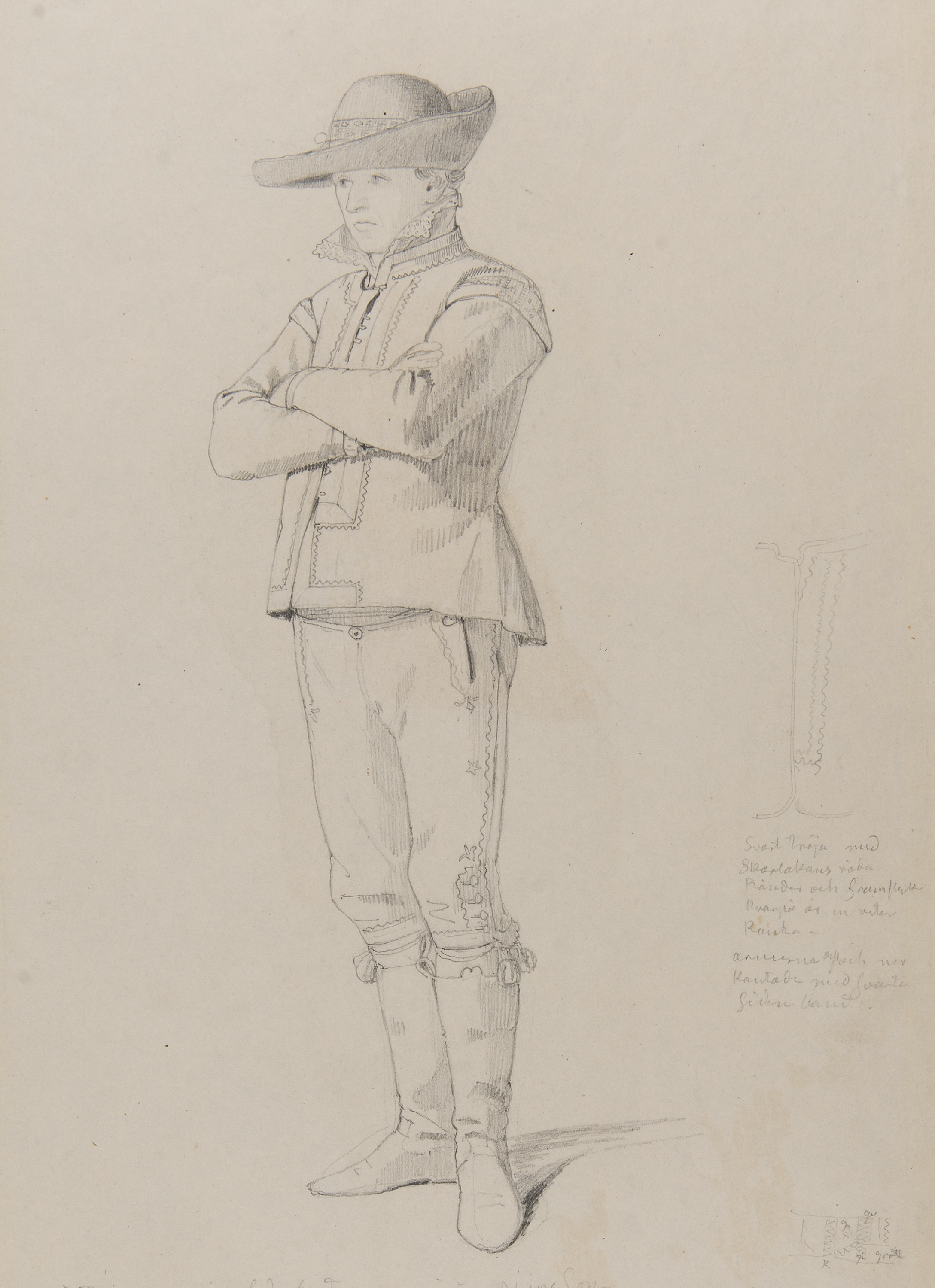 Blyertsteckning, Mårten Jönsson, Söfvestad, Herrestad, Herrestads härad i dräkt. Akvarell i storformat av Otto Wallgren Depicted place: Q3591509 (Q3591509) (Härad), Scania (Q180756)